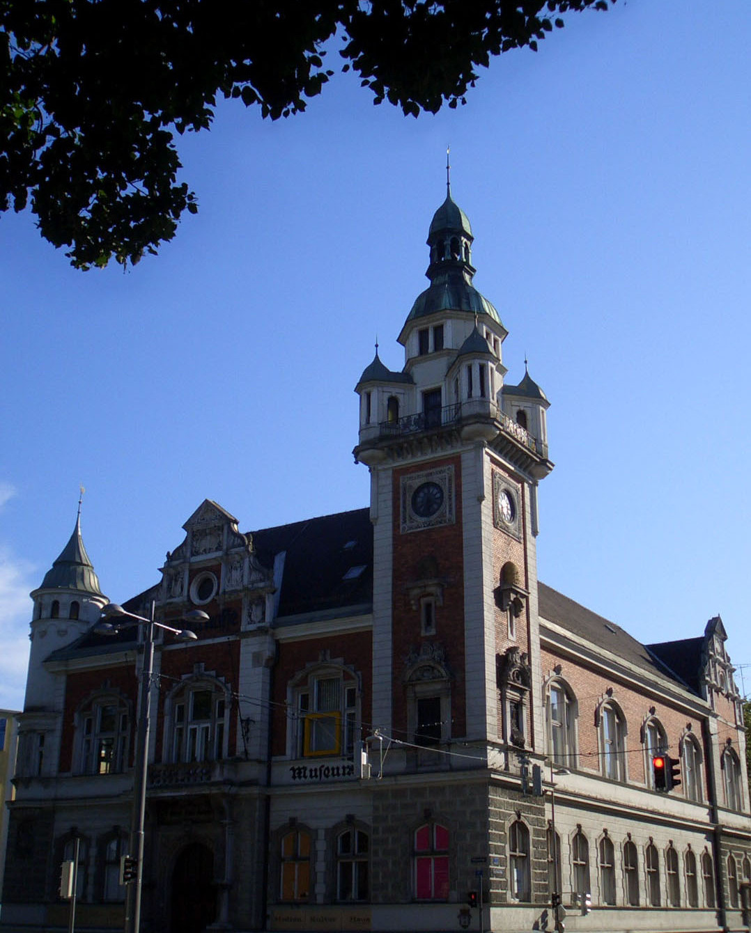 Altes Sparkassengebäude in Wels